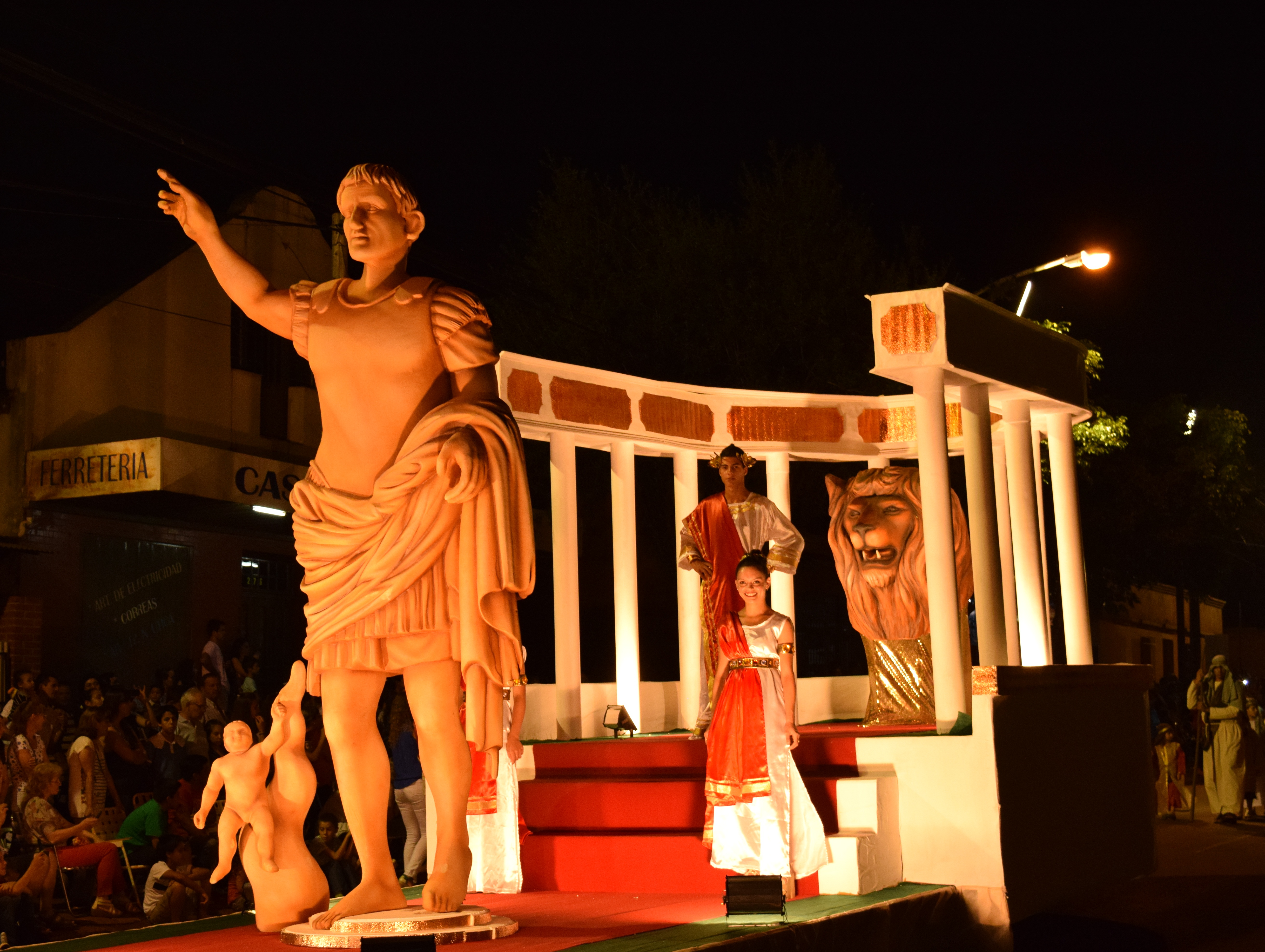 Desfile de carrozas en la Fiesta Nacional de la Navidad del Litoral, en Leandro N Alem, Misiones, Argentina.